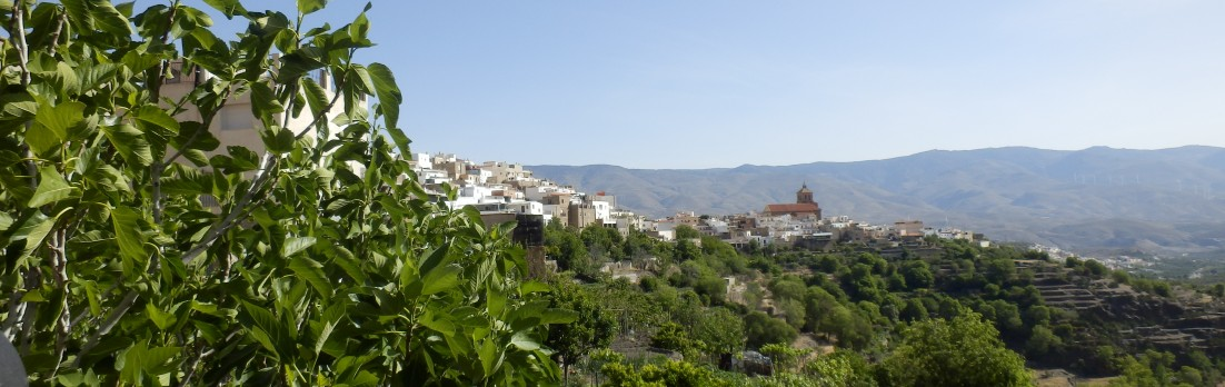 Abrucena